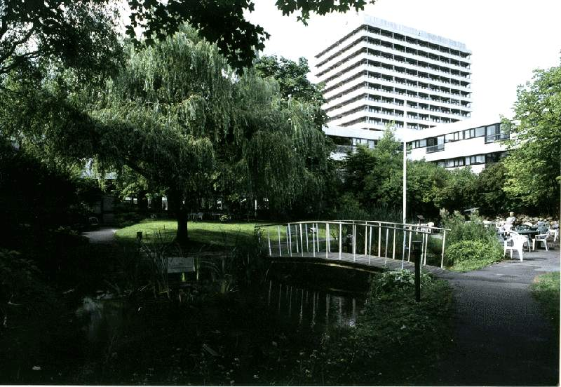 Haven i Peder Lykke Centeret (1970) udført af Kanonklubben; en professorløs kunstnergruppe på Det Kongelige Danske Kunstakademi. Gruppen eksisterede fra 1968-1970. Billedet er taget i 1999 af Kirsten Dufour, der ligeledes var medlem af gruppen.